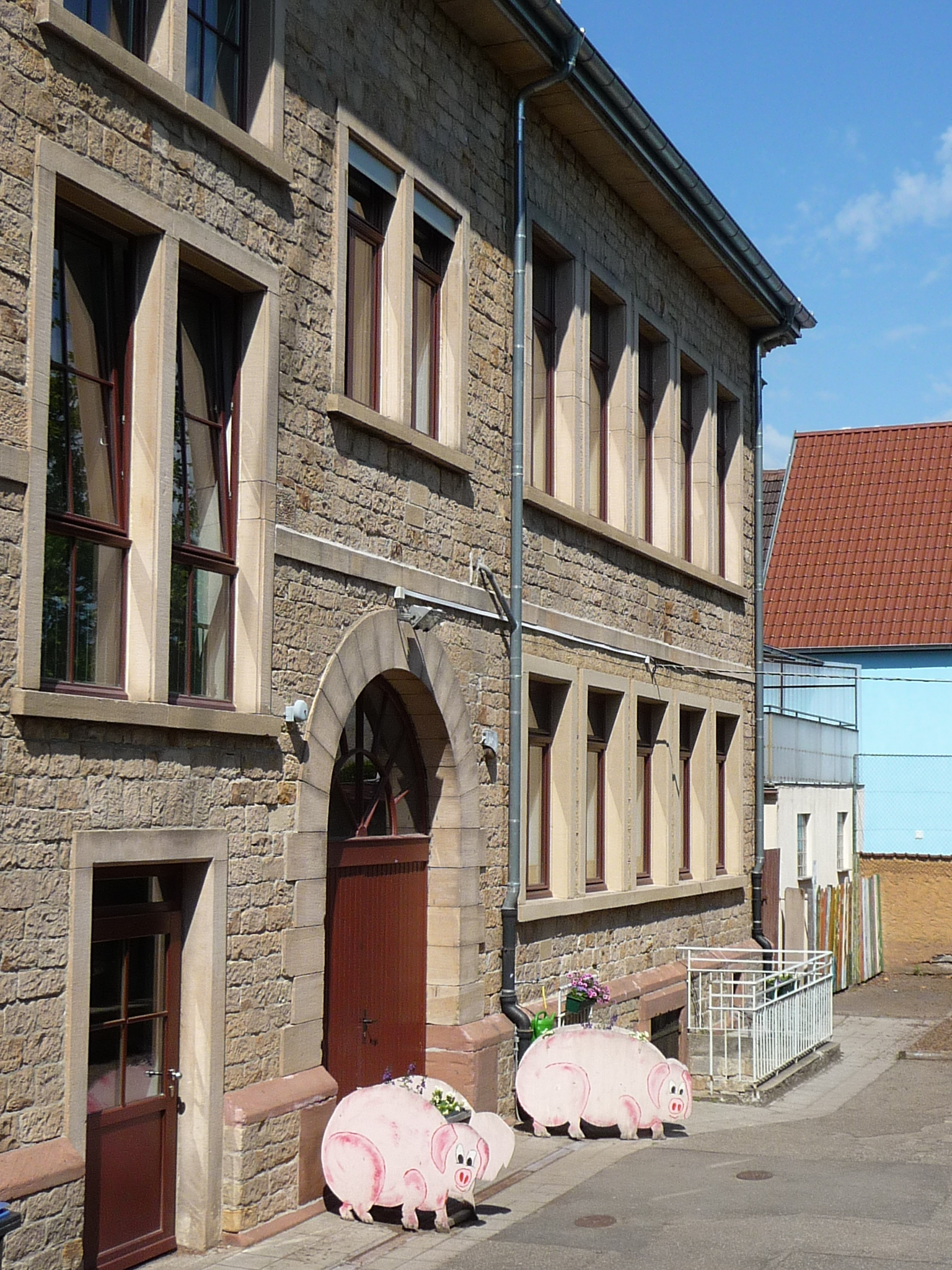 Queichheim ist ein Stadtteil von Landau in der Pfalz in Rheinland-Pfalz.